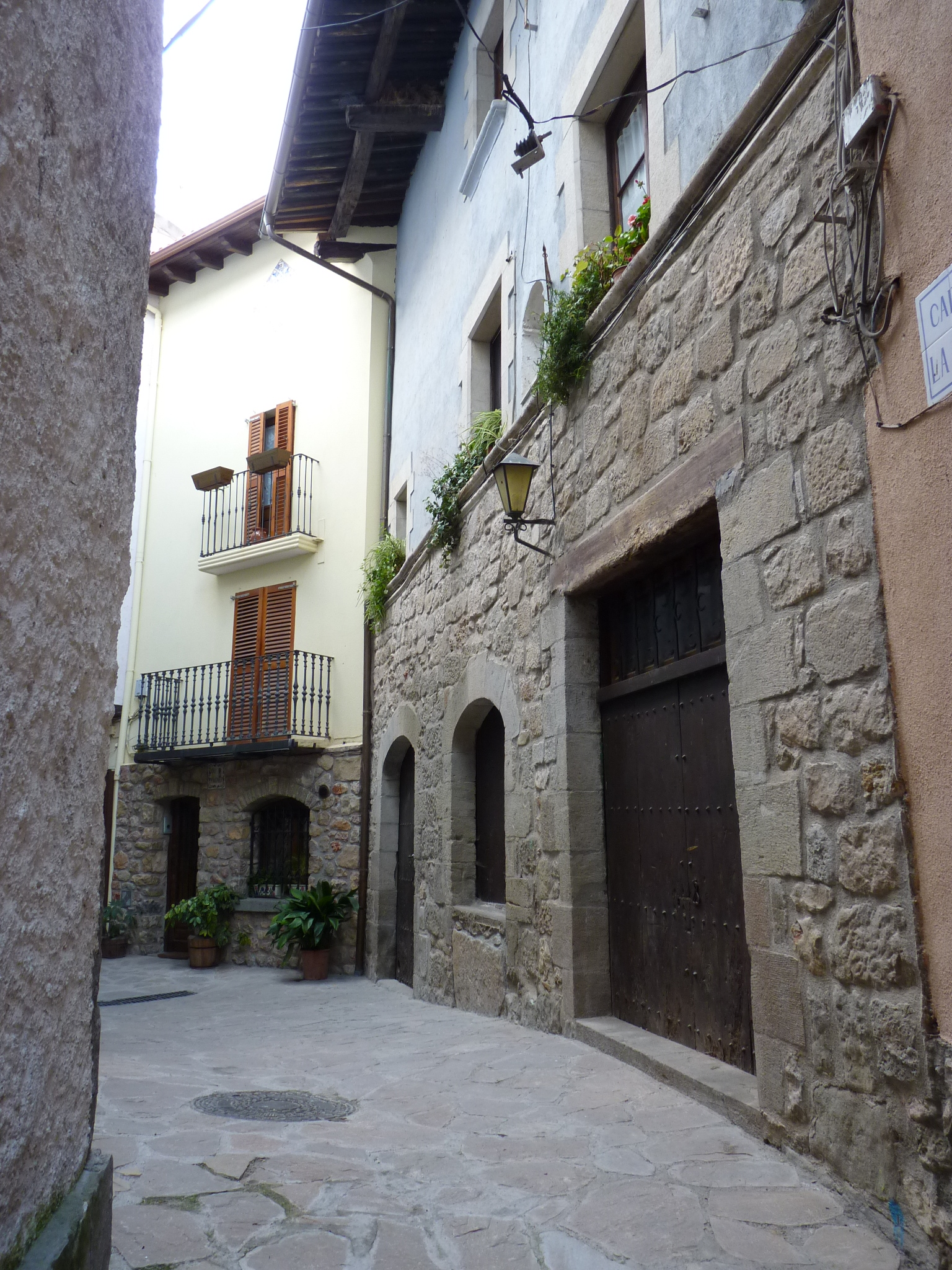 peramola